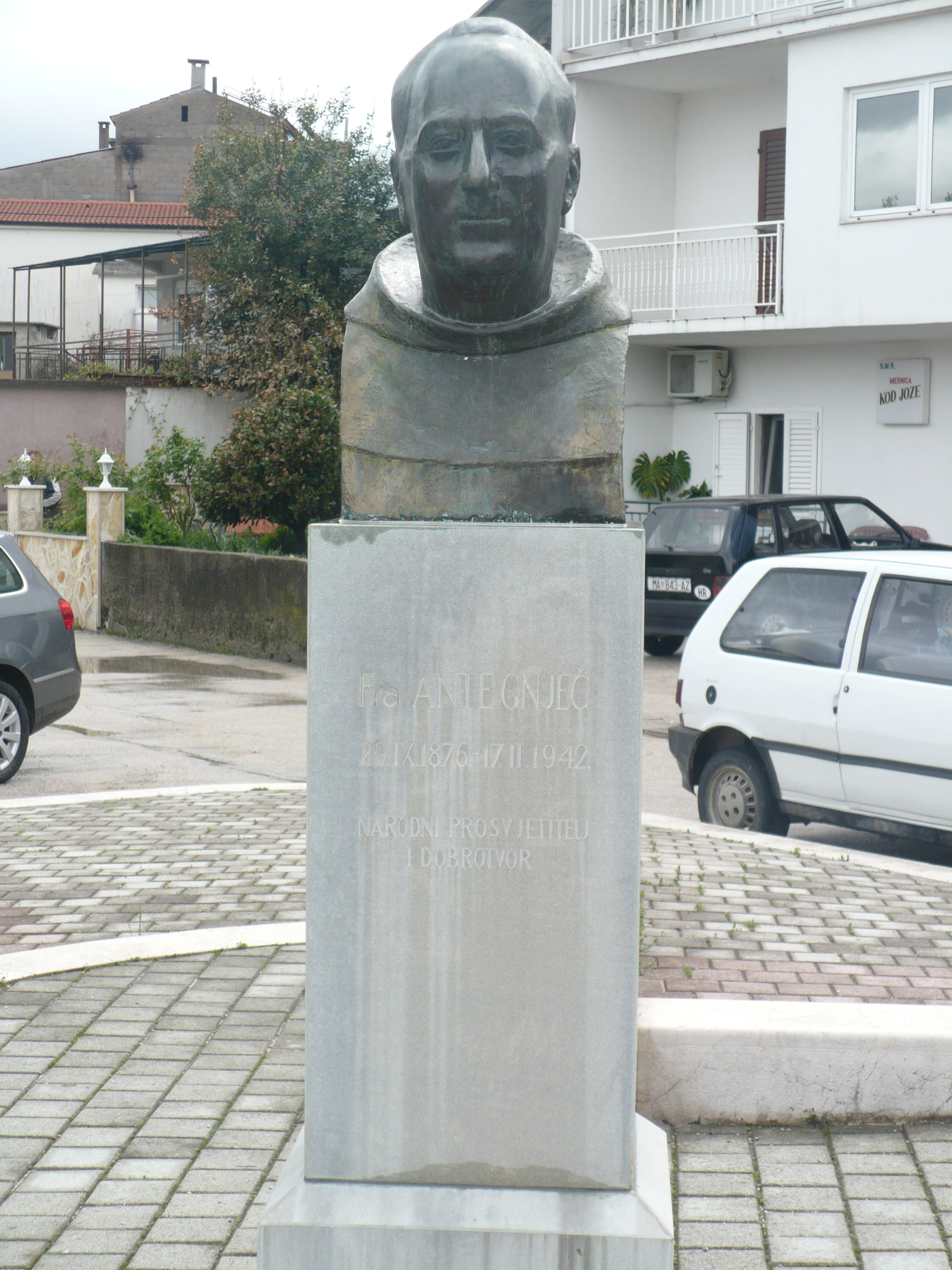 fra ante gnjec heykeli